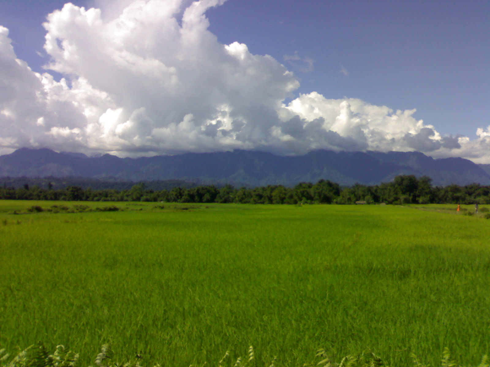 लीलाबाड़ी विमानक्षेत्र से उत्तरी दिशा में हिमालय का दृश्य